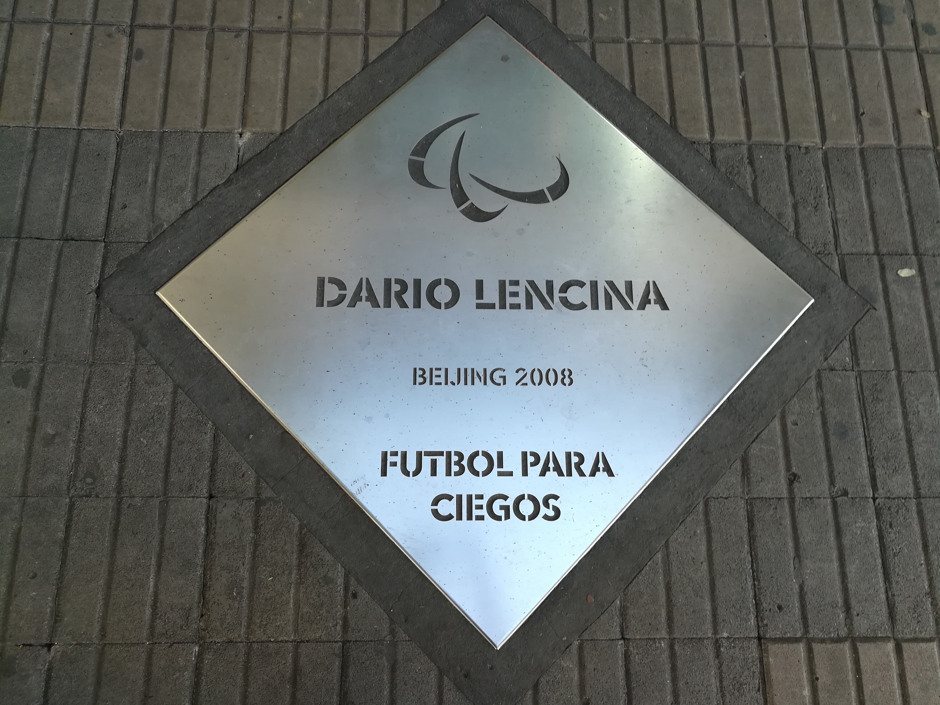 Paseo de los Olímpicos de los en la Avenida Pellegrini (Rosario).